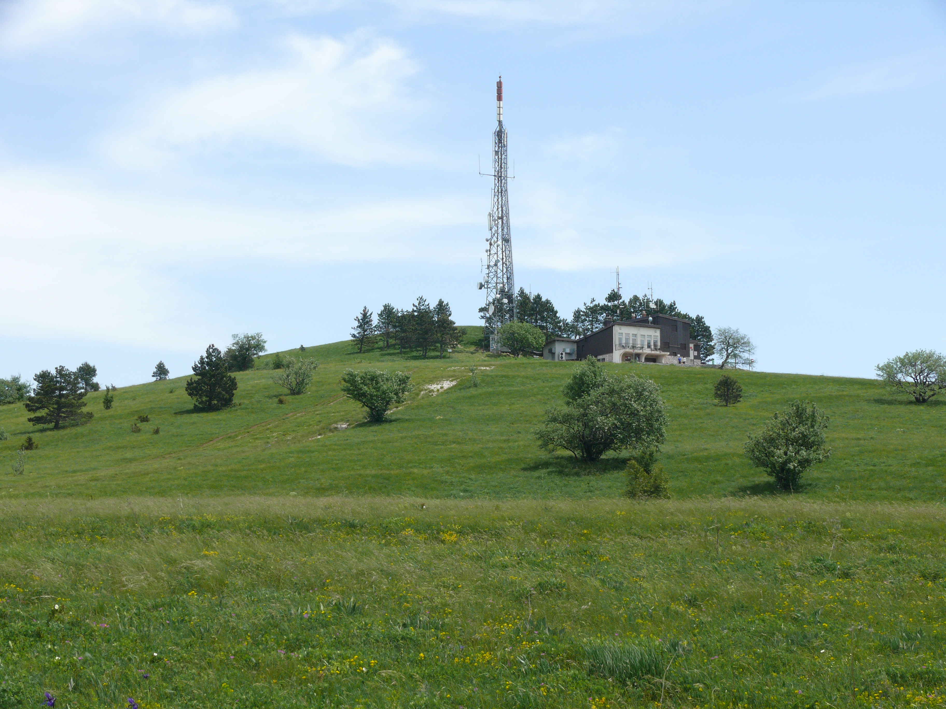 Sendeanlage auf dem Slavnik, Slovenien